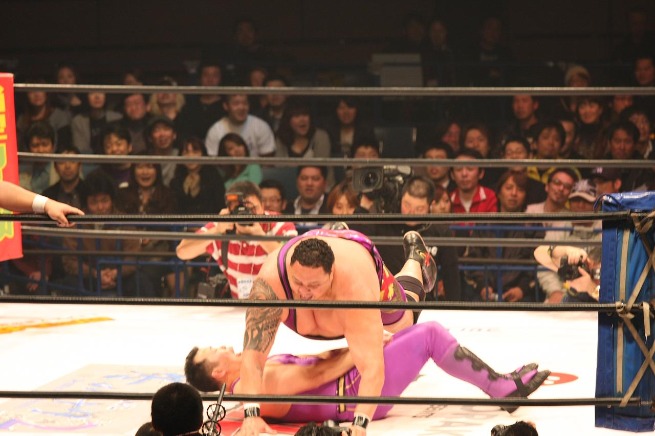 Akebono spalsh